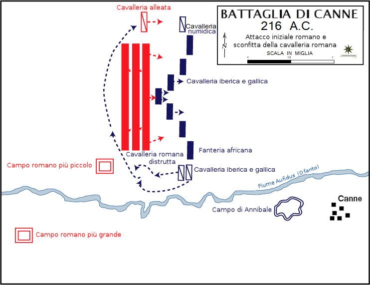 Traduzione italiana di File:Battle of Cannae, 215 BC - Initial Roman attack.gif